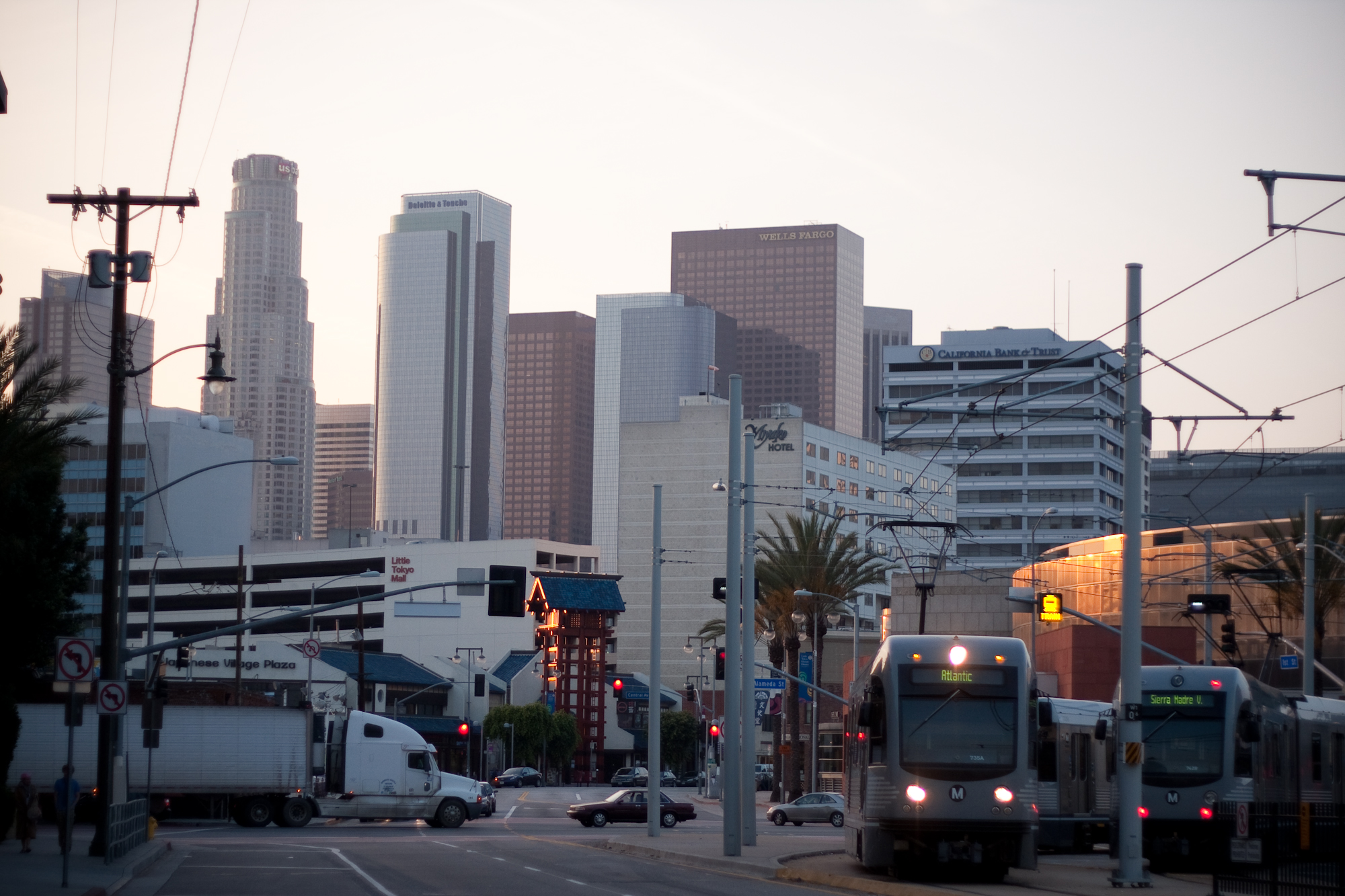 Little Tokyo, Los Angeles